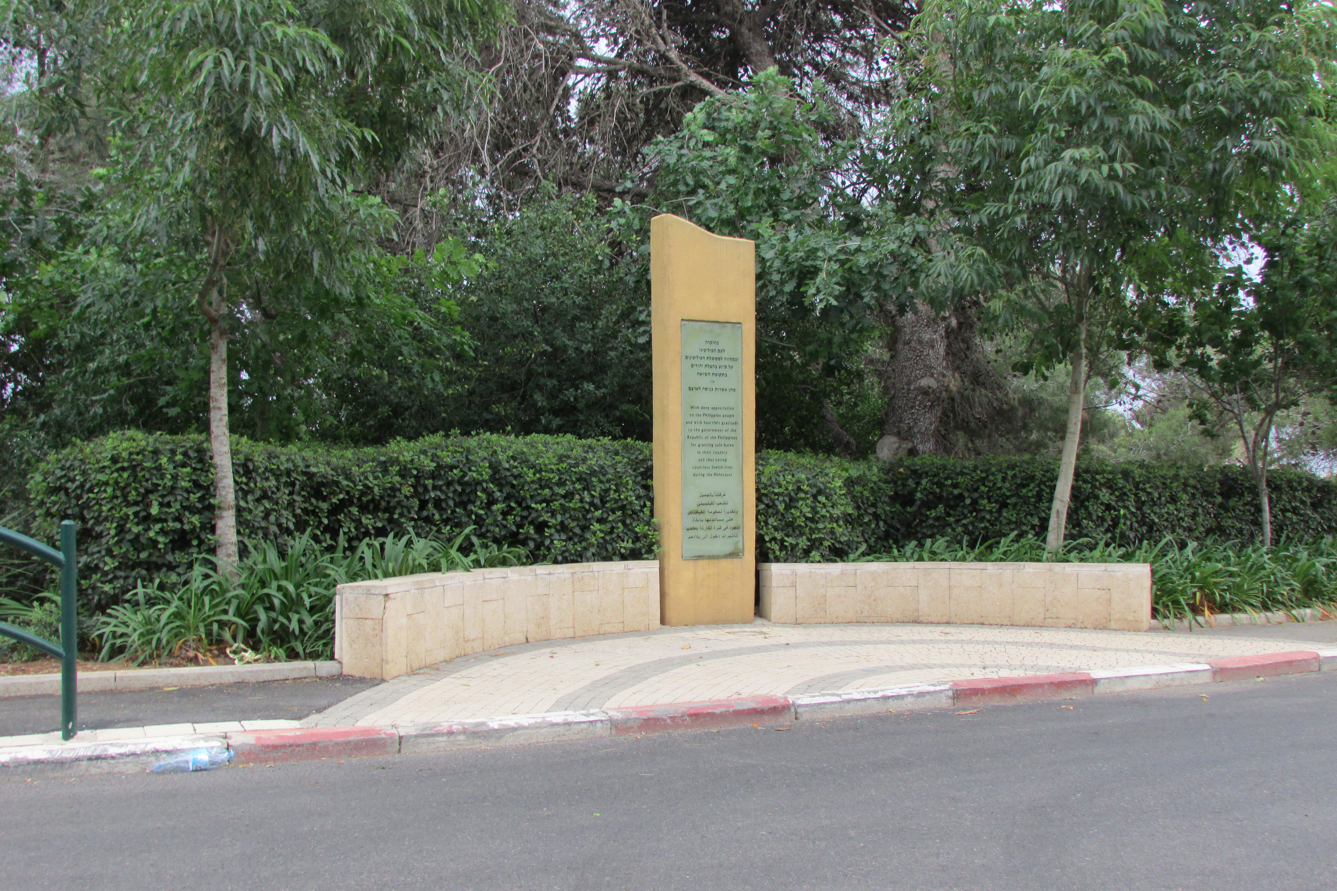 Denia, Haifa